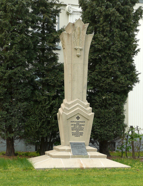 Gefallenen-Ehrenmal der Telegraphen-Bataillone Nr. 3 und Nr. 6 in Hannover-List am Nordring; unter Denkmalschutz